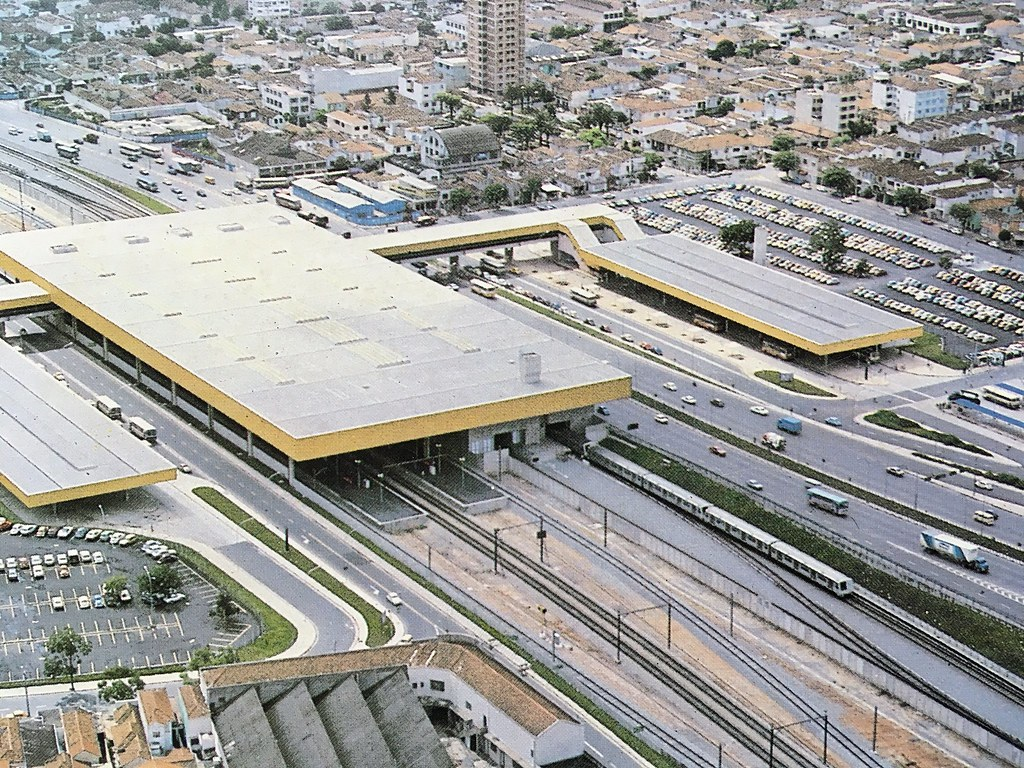 Vista da Estação Tatuapé, recém construída. O estacionamento do lado direito da foto foi substituído por um estacionamento garagem que operou até meados da década de 1990, quando foi desativado. Desde 1997 ali funciona o Shopping Metrô Tatuapé.